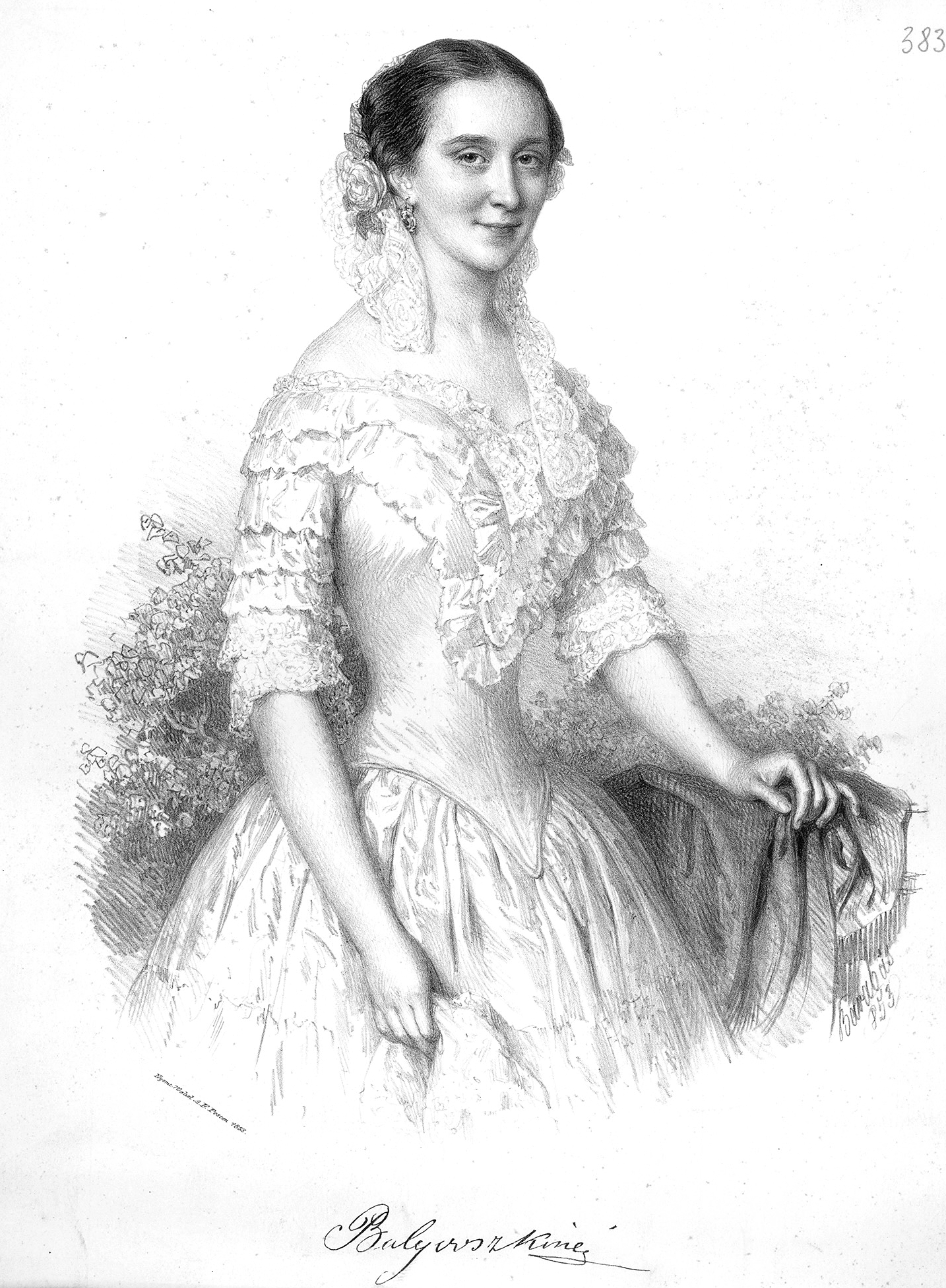 Bulyovszkyné Szilágyi Lilla (Kolozsvár, 1833. május 25. – Graz, 1909. december 11.) magyar színésznő, aki legnagyobb sikereit külföldön aratta; műfordító.